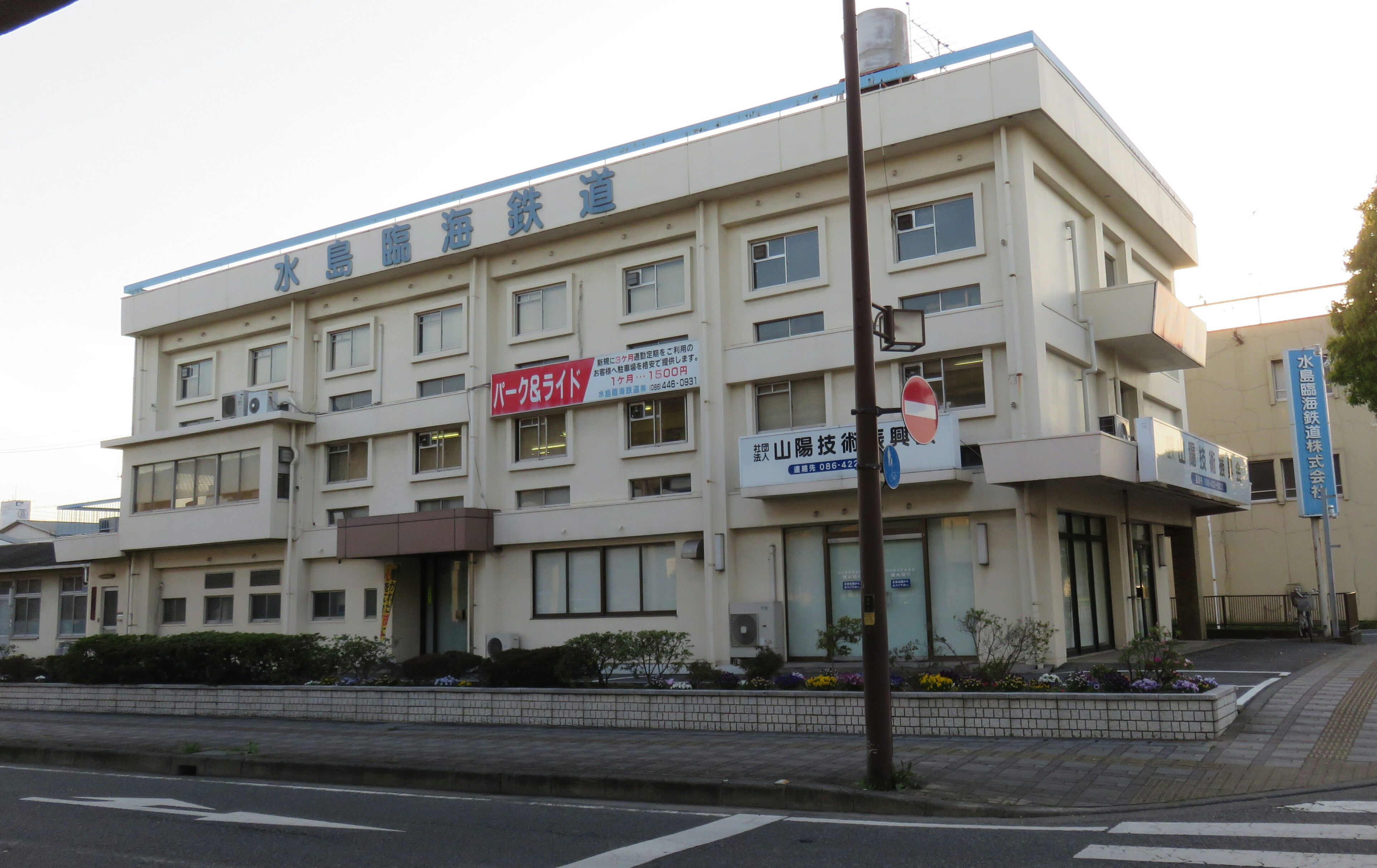 水島臨海鉄道 本店（2015-04-17）